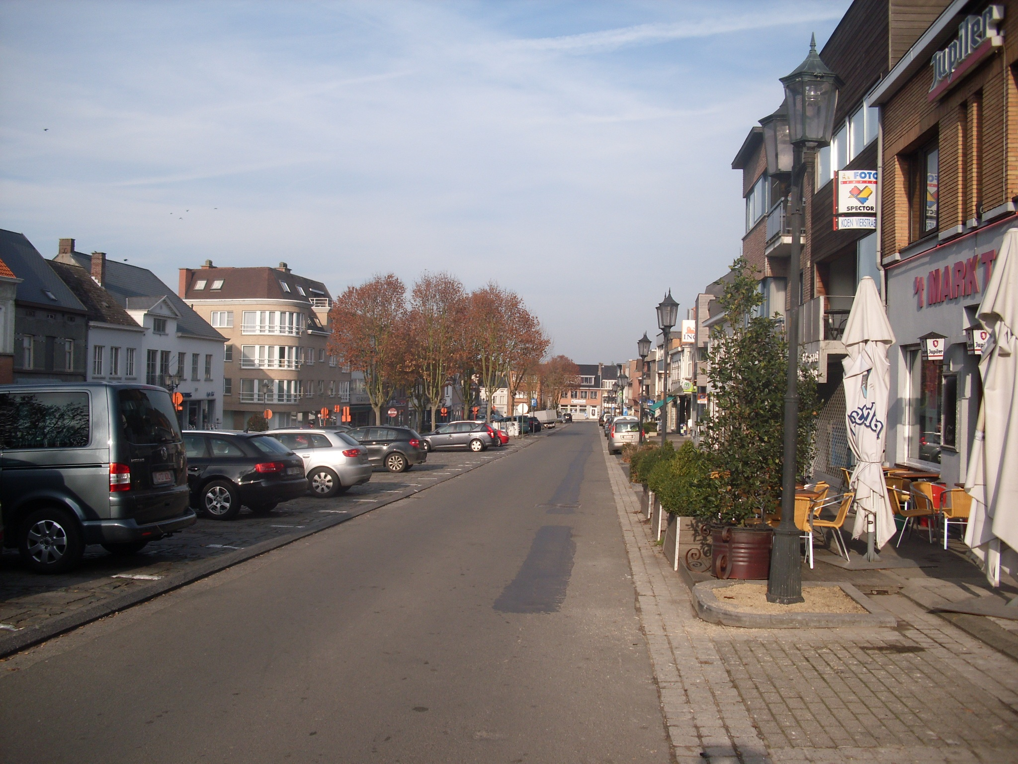 De Markt van Gavere in Noordelijke richting - Oost-Vlaanderen - België